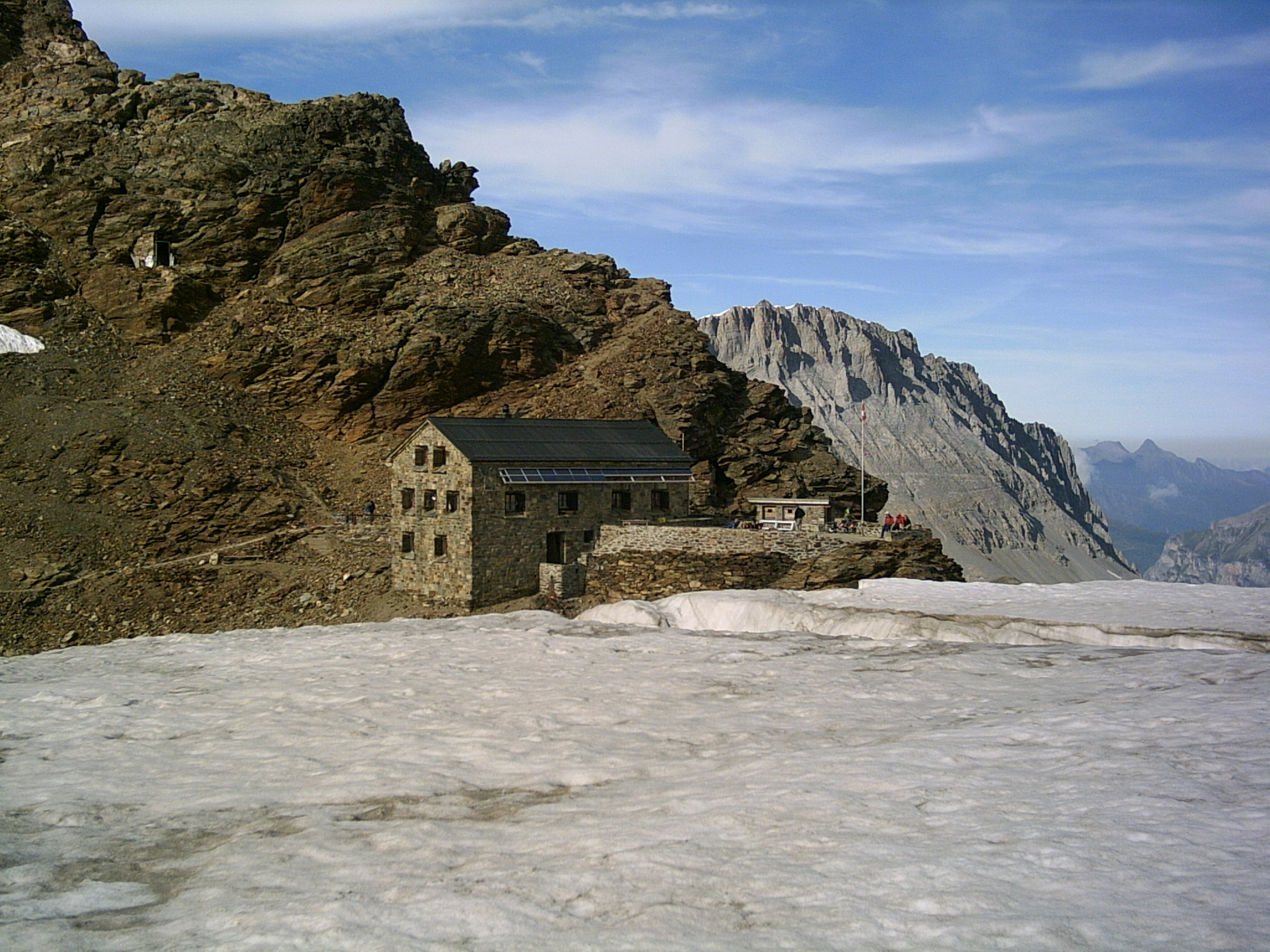 Mutthornhütte Schweiz